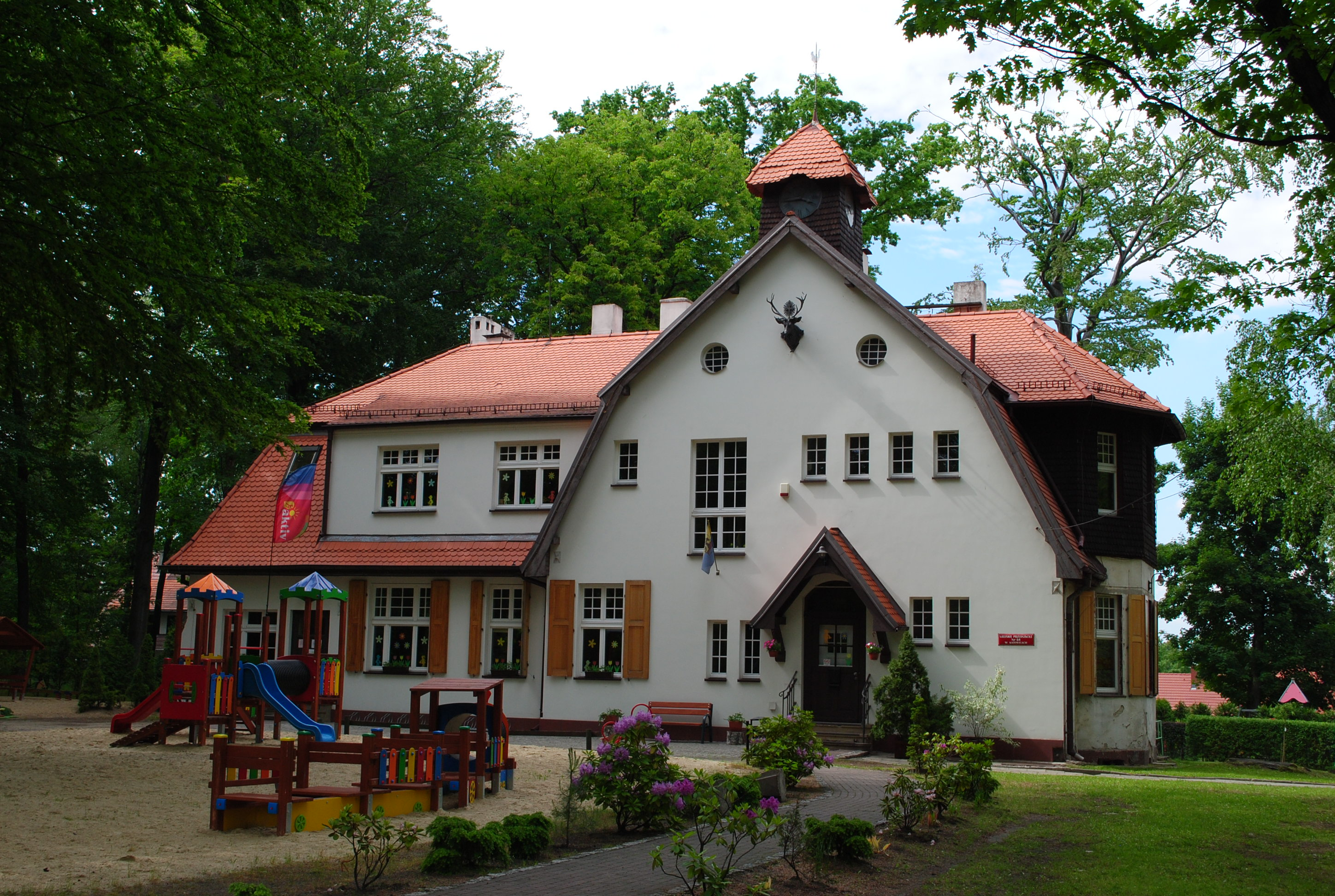 Katowice - Giszowiec. Plac Pod Lipami 2. Miejskie Przedszkole nr 64